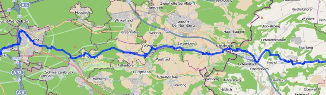 Jakobsweg von Sindlbach nach Feucht © OpenStreetMap contributors